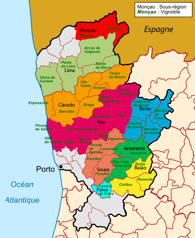 Carte du vignoble du vinho verde au Portugal